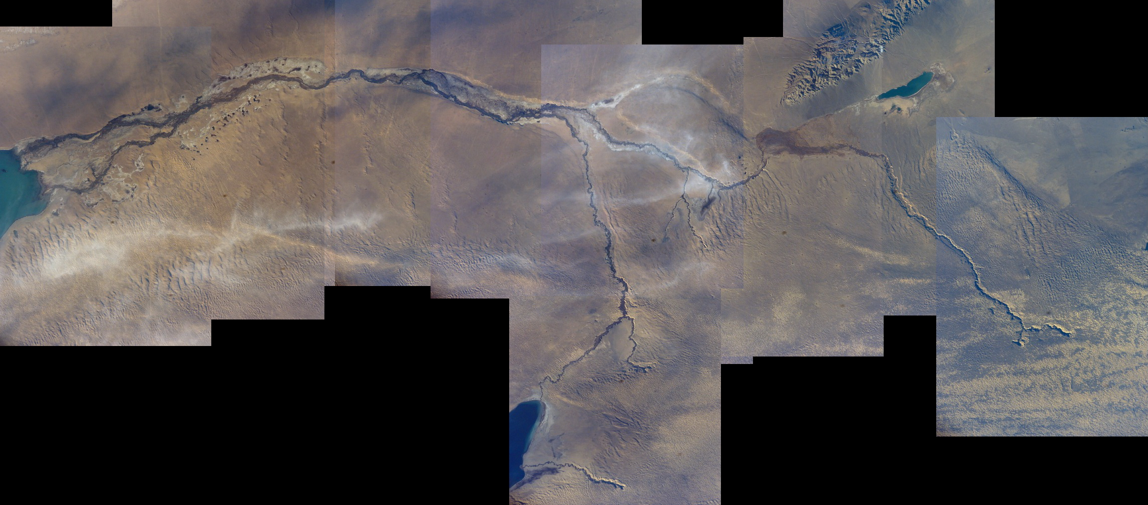 Спутниковое изображение основного течения Нарийн-Гола. Целиком виден левый приток Нарийн-Гола — Хойт-Гол, вытекающий из озера Баян-Нур. Составлено по снимкам NASA. Нарийн-Гол протекает по Монголии и России, впадает в озеро Убсу-Нур.